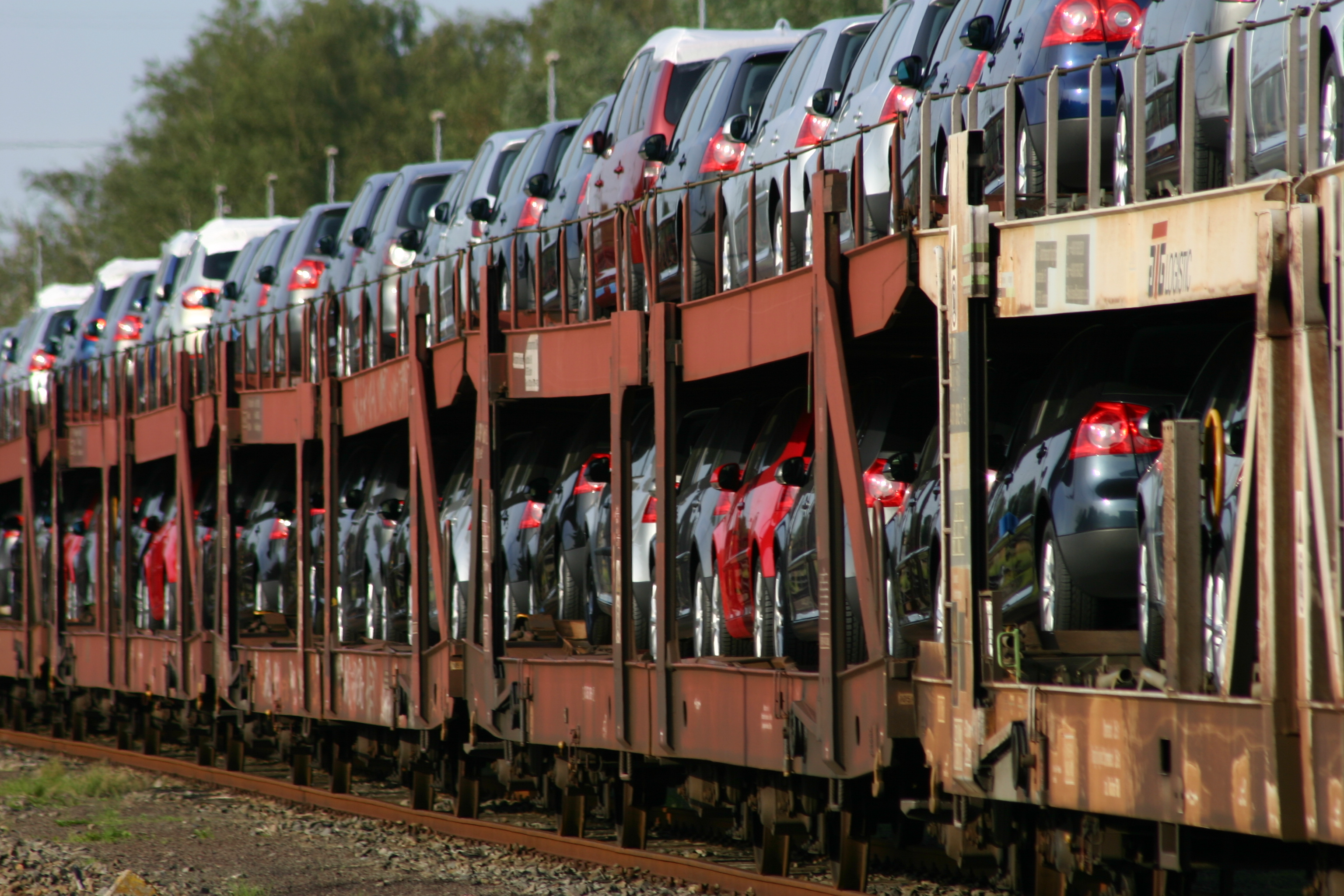 Autozug, beladen mit VW Golf, im Emder Hafen